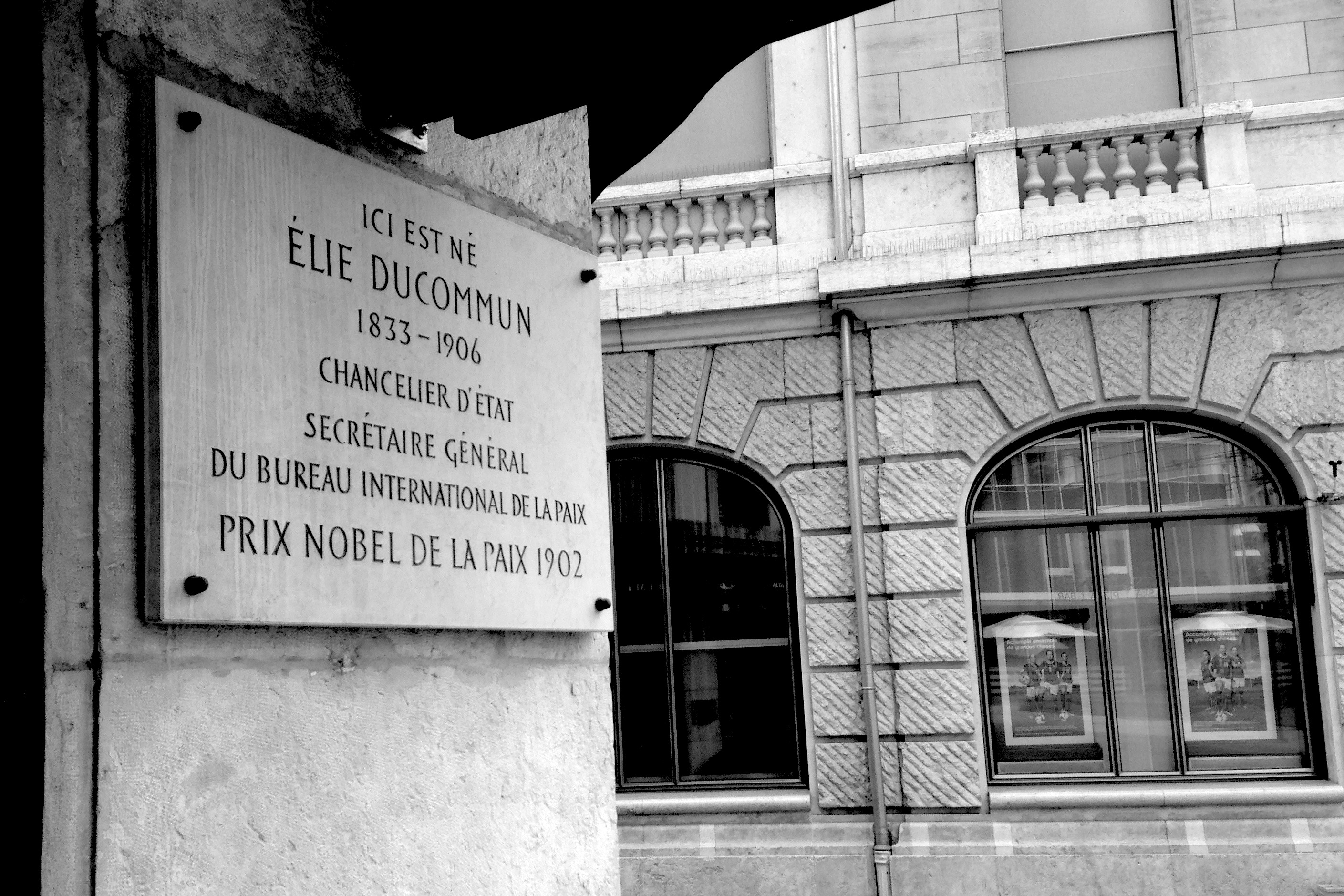 Plaque commémorative sur la maison de naissance d'Elie Ducommun, Rue de Coutance (Genève)